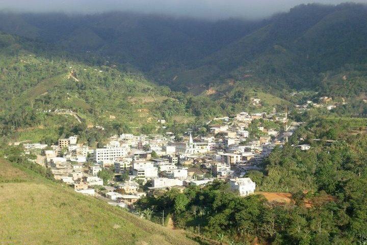 Atardecer en Balsas, la ciudad vergel